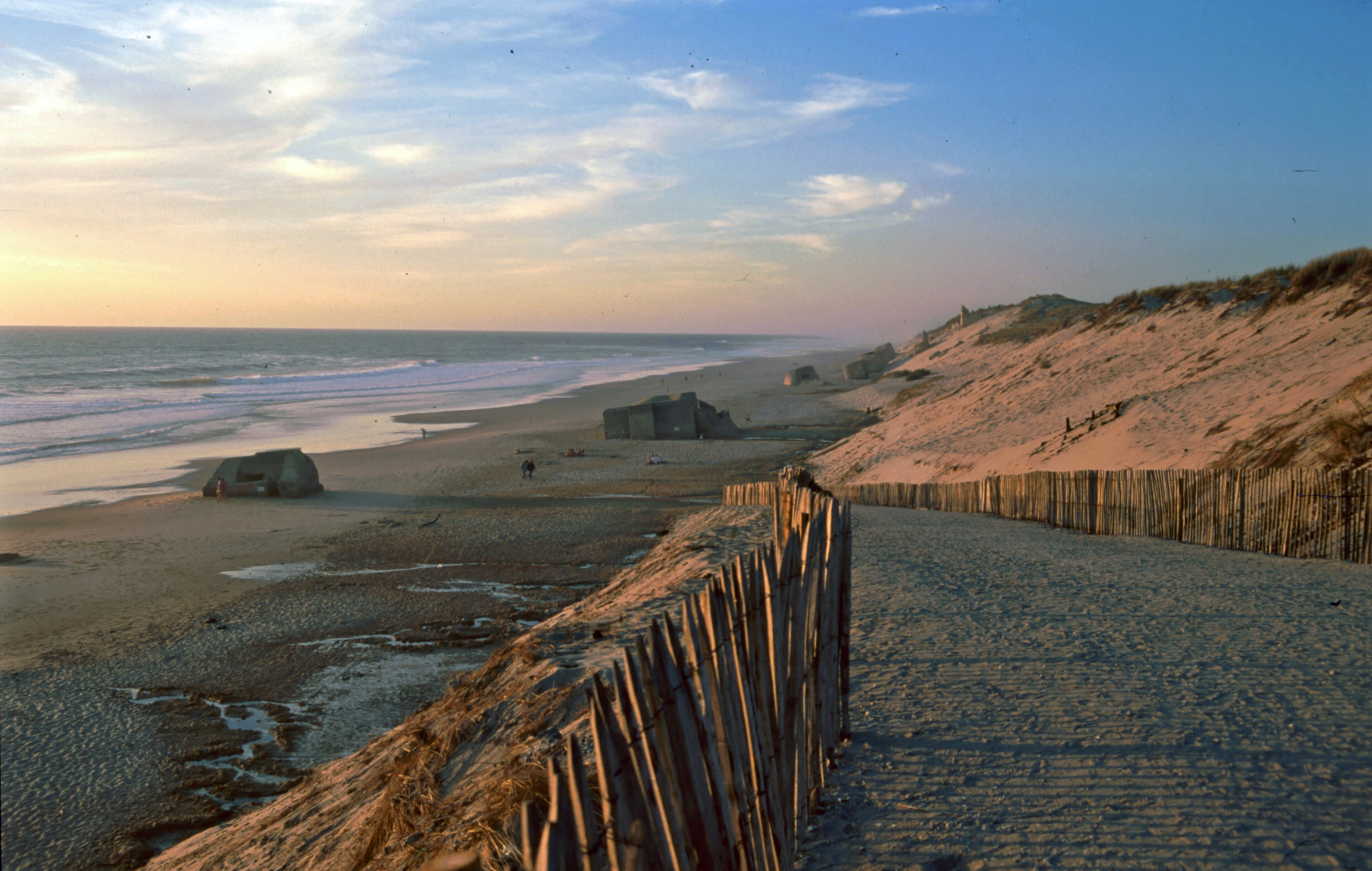 Le Pin Sec (1995)